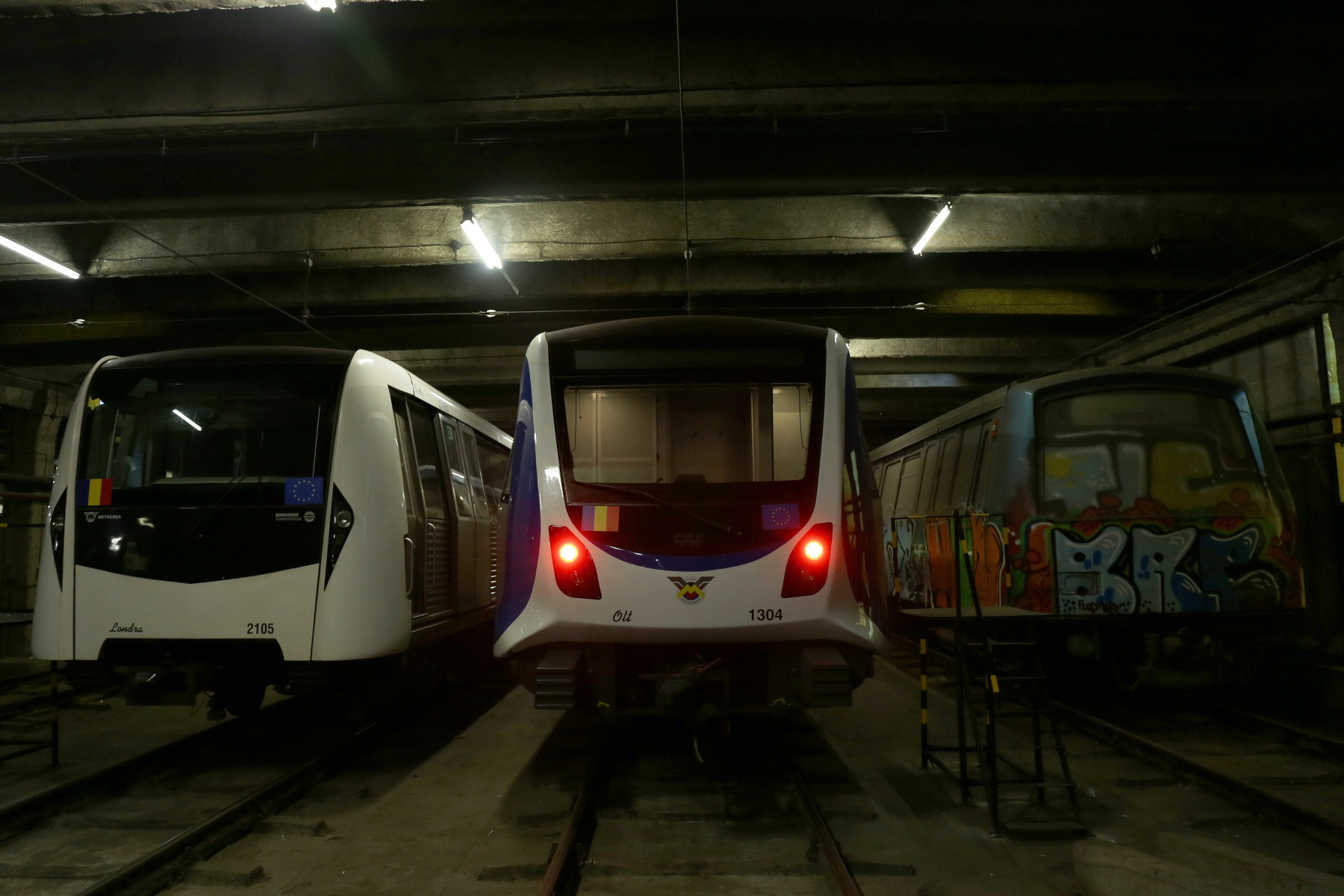 Rame Bombardier, CAF și Astra IVA din dotarea metroului București in depoul Berceni